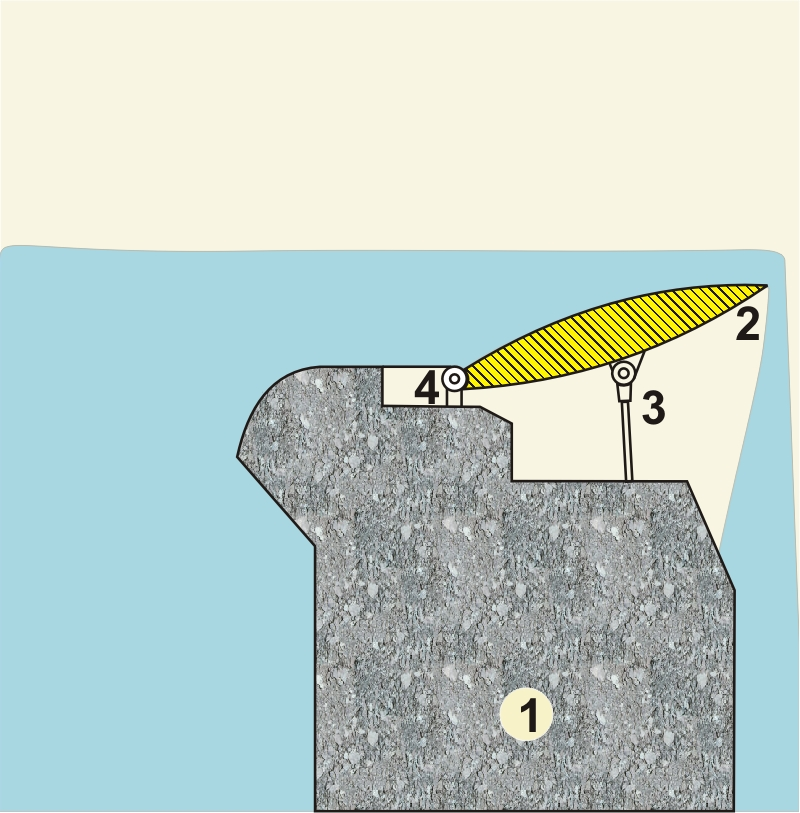 Schema einer geöffneten Fischbauchklappe